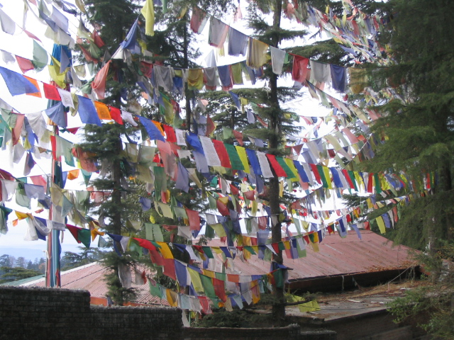 Tibetaj preĝflagoj apud Dharamsala, Barato